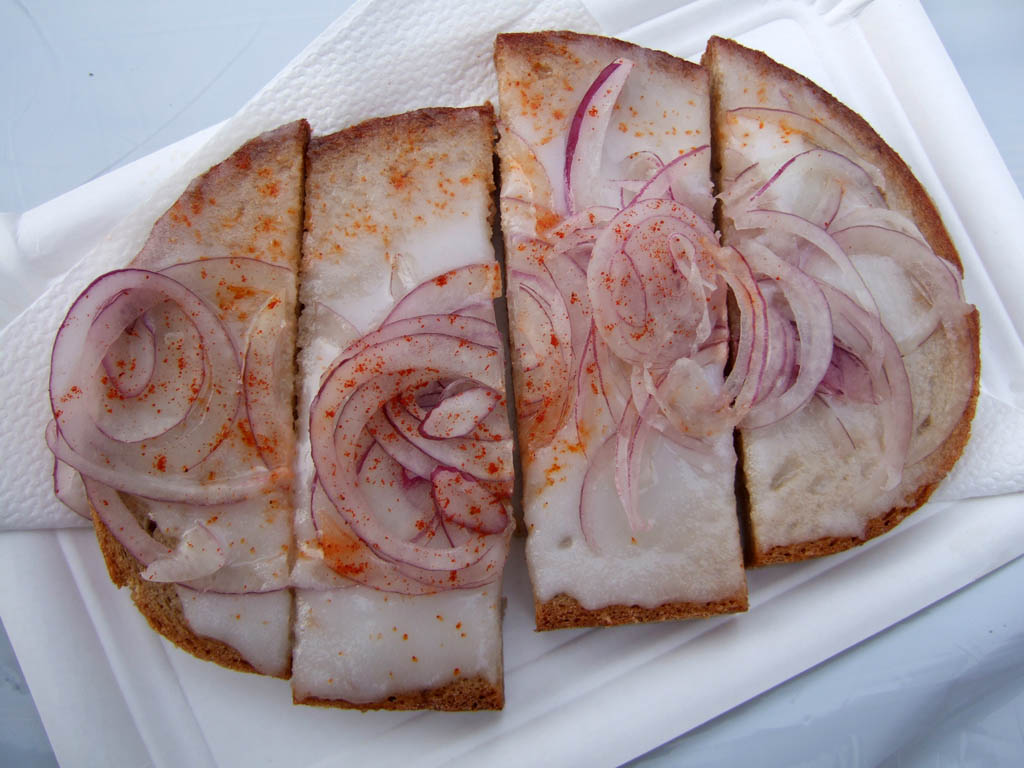 Schmalzbrot mit Zwiebel